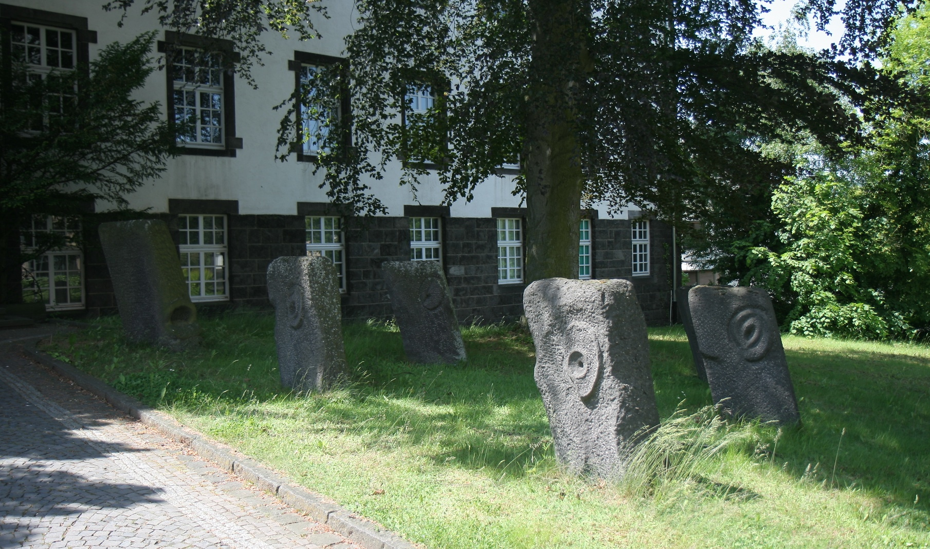 Basaltskulpturen "Kopfgruppe" von Peter Rübsam vor dem Altbaugebäude des Amtsgerichts Mayen in Mayen.